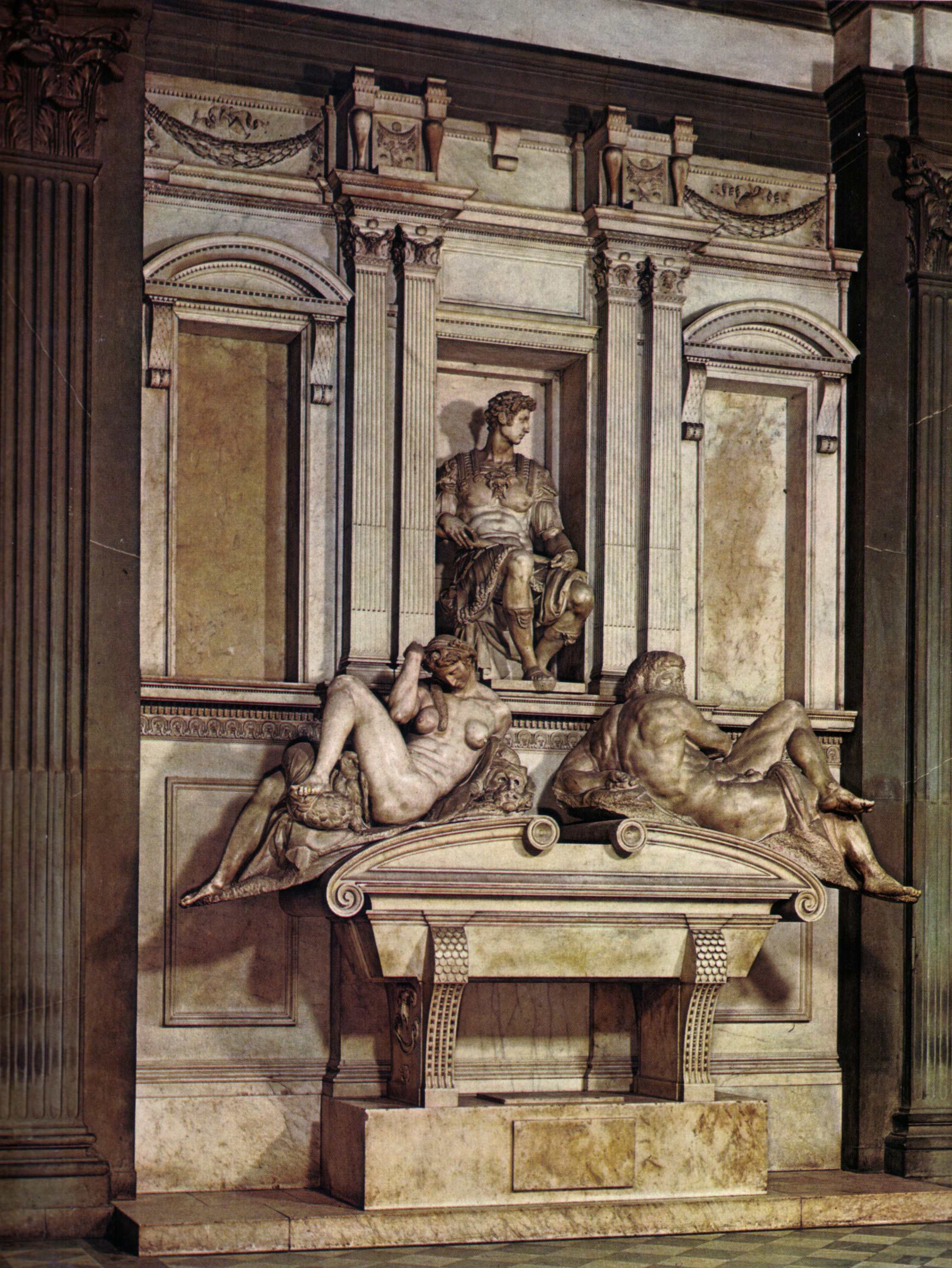 Vedi nome file Categoria:Immagini su opere di Michelangelo